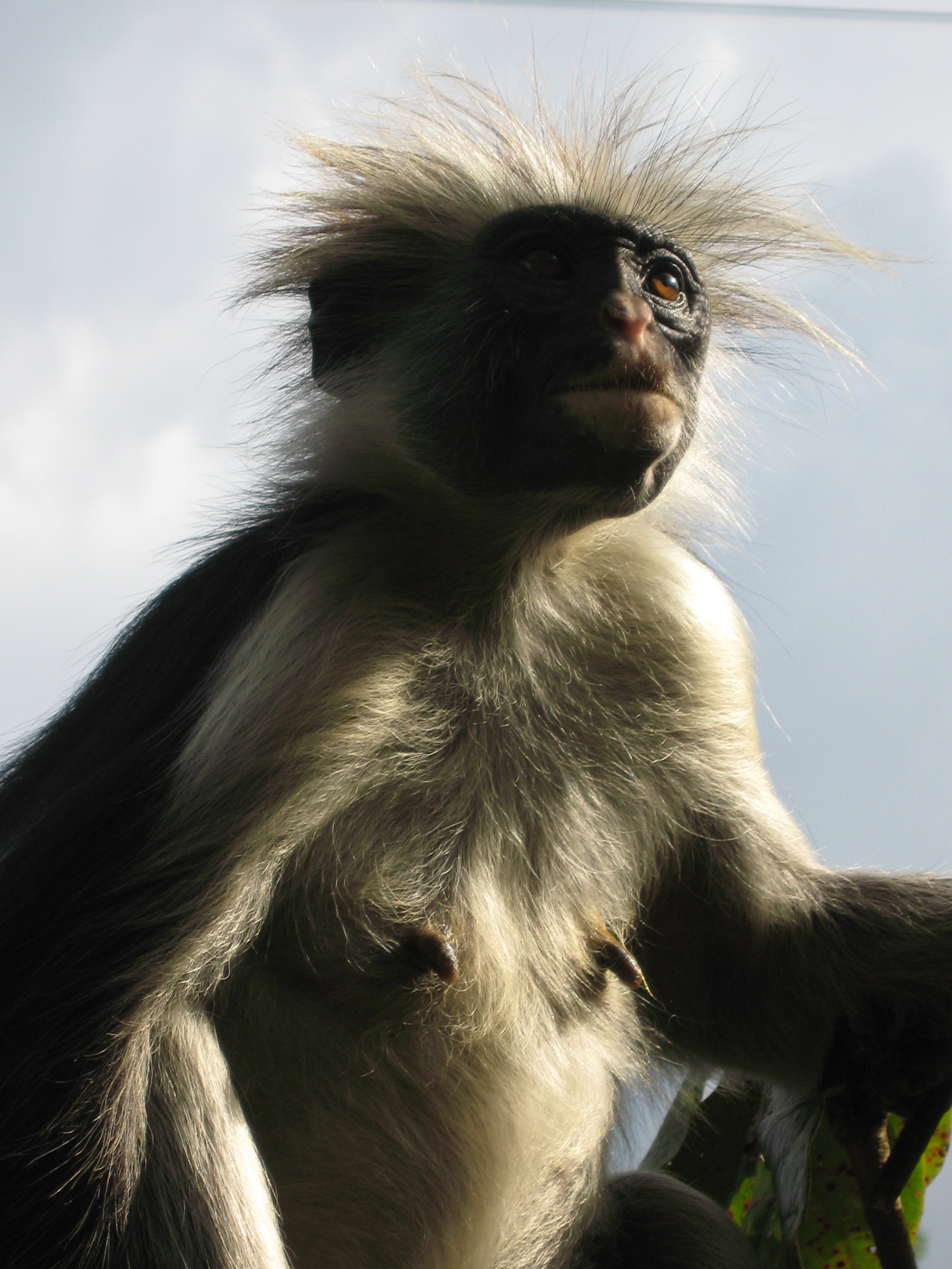 Red colobus monkey, Jozani, Zanzibar